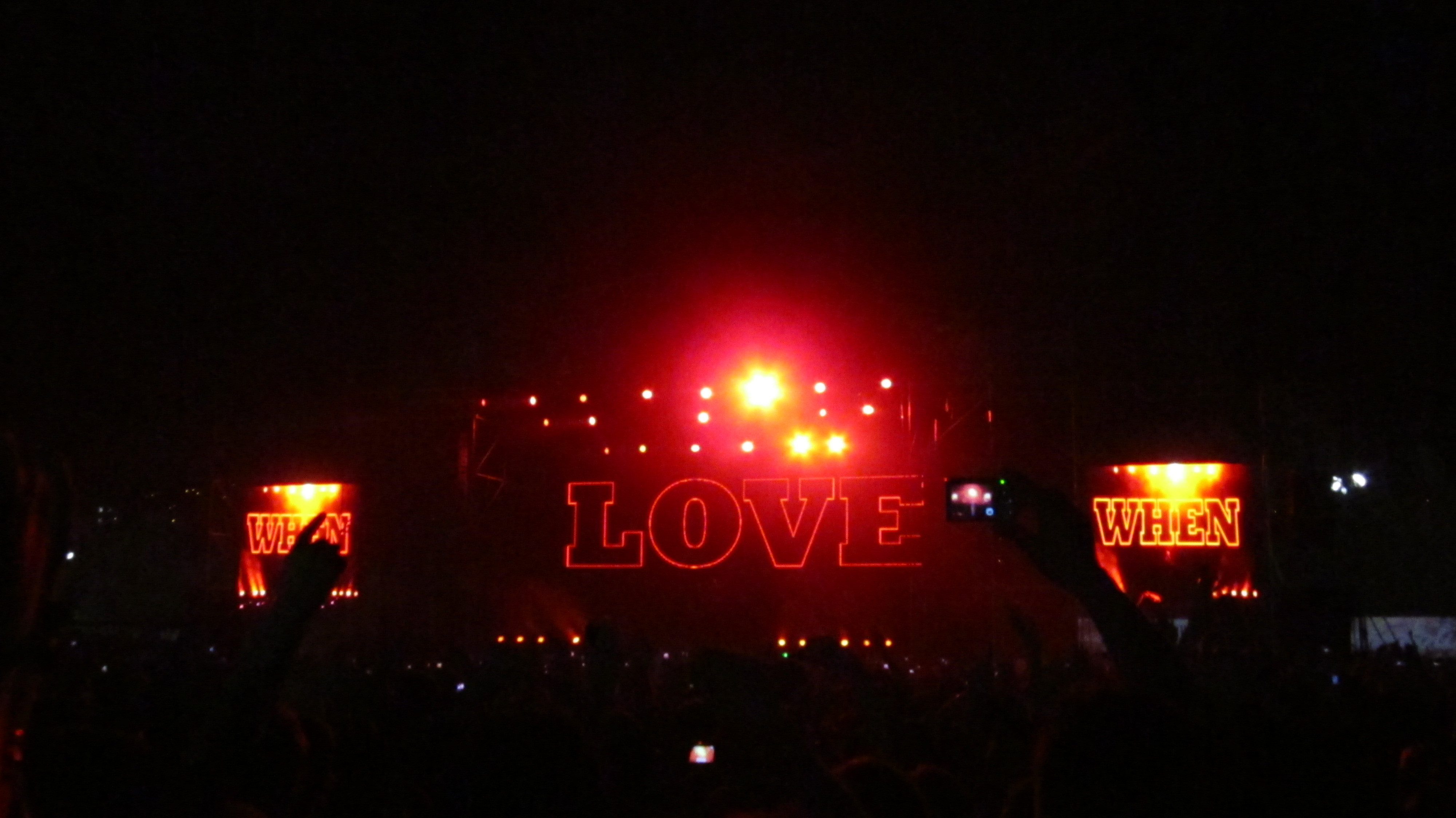 Concierto de David Guetta en el Valparaíso Sporting, Viña del Mar, Chile.